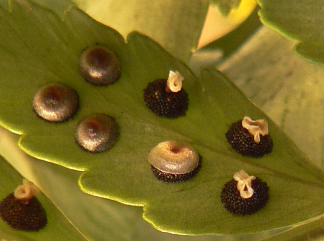 cropped